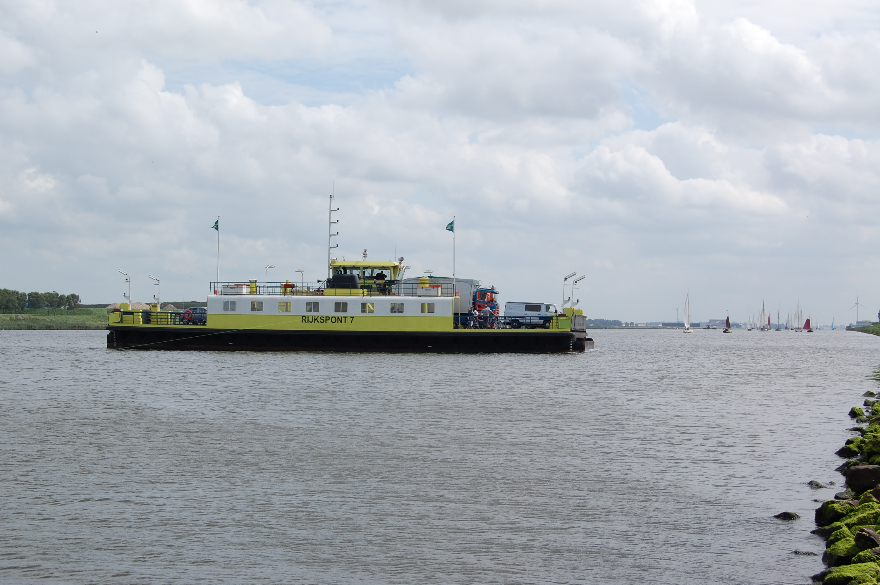 Noordzeekanaal met de Rijkspont nummer 7 te Buitenhuizen.